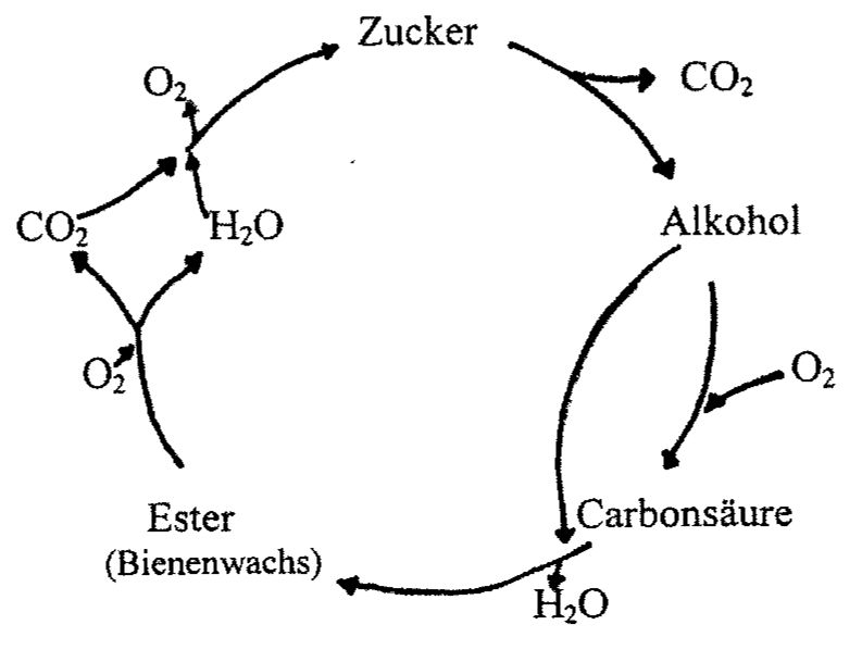 SchematischerKohlenstoffkreislauf mit Bienenwachs als Beispiel für Ester-Verbindungen; Lehrstück Faradays Kerze, Susanne Wildhirt